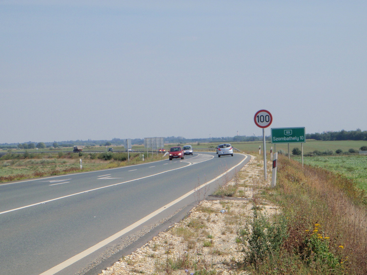 B89 Steinamnagerer Strasse, Knote Torony